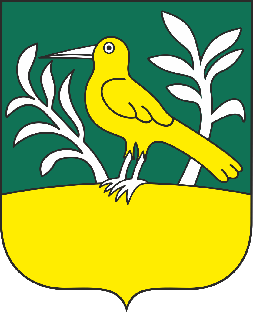 Erb Diviny